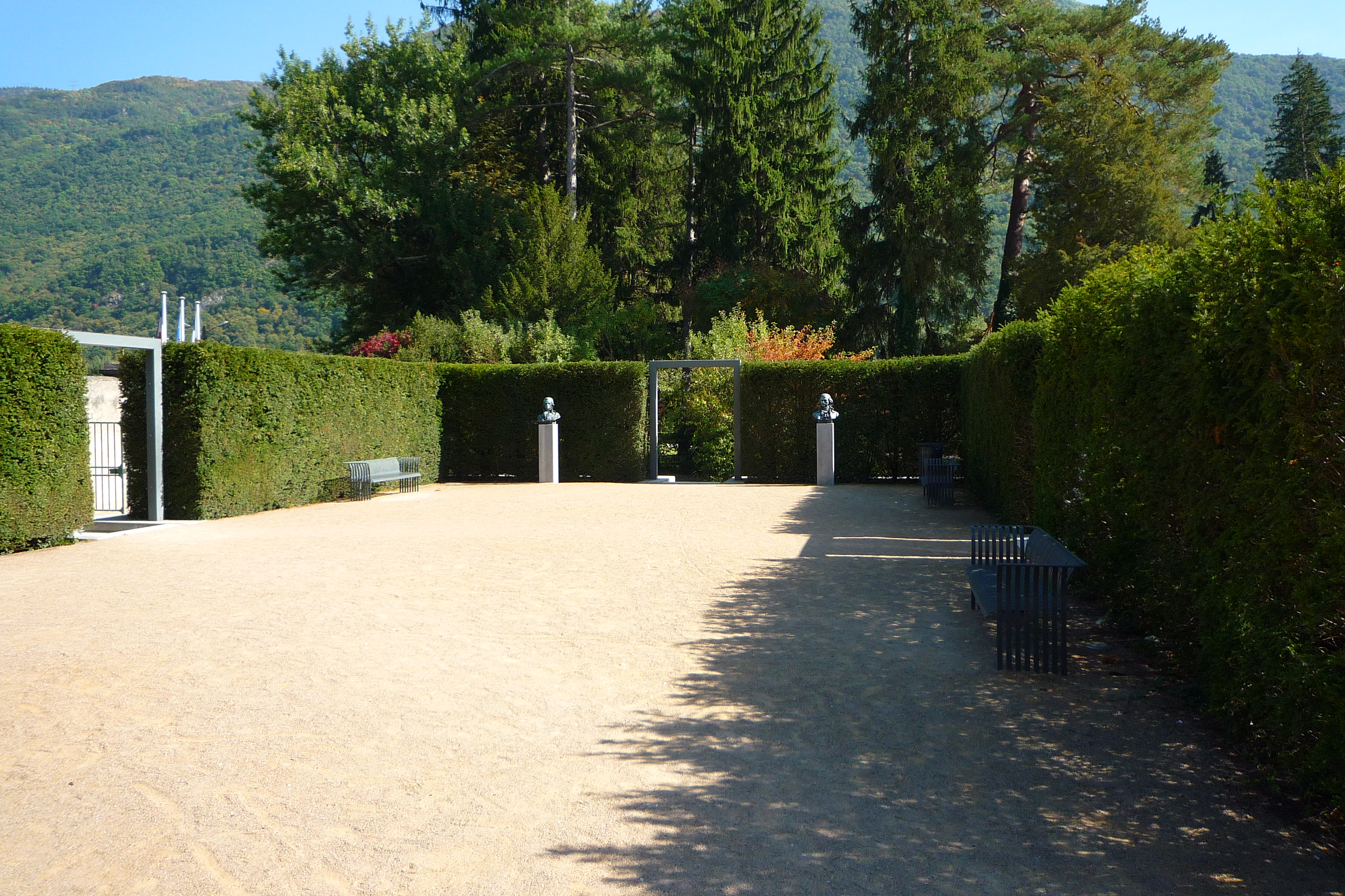 Emplacement de la salle du Jeu de paume du château de Vizille (France). Détruite en 1825 par un incendie, elle est immédiatement reconstruite puis redétruite en 1865 par un nouvel incendie. Site du Musée de la révolution française.